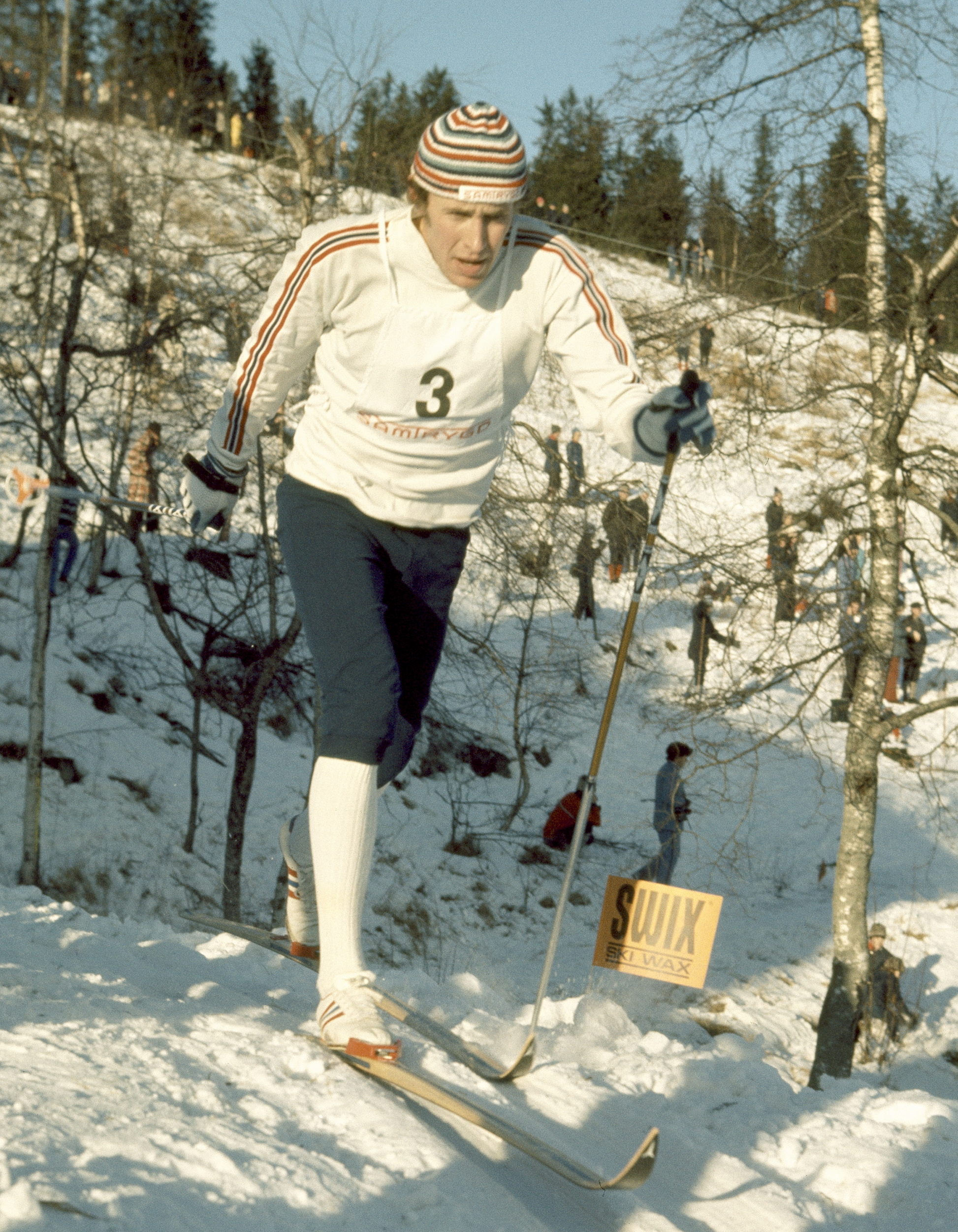 Formo i BUL-sprint. Frognerseteren.